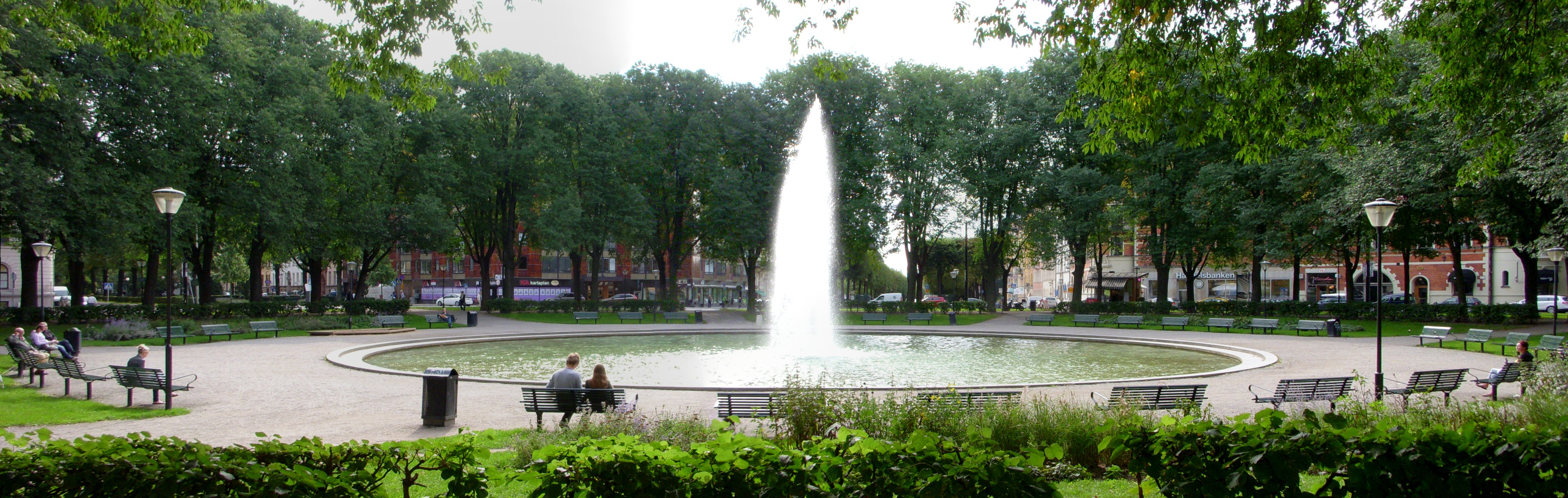 Karlaplan i Stockholm